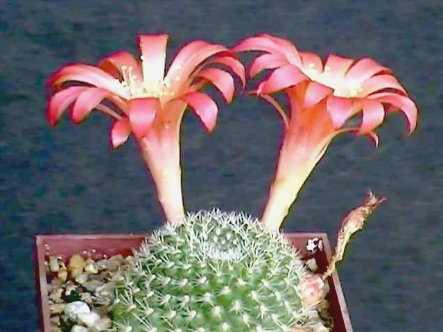 Rebutia minuscula (Syn. Rebutia grandiflora)